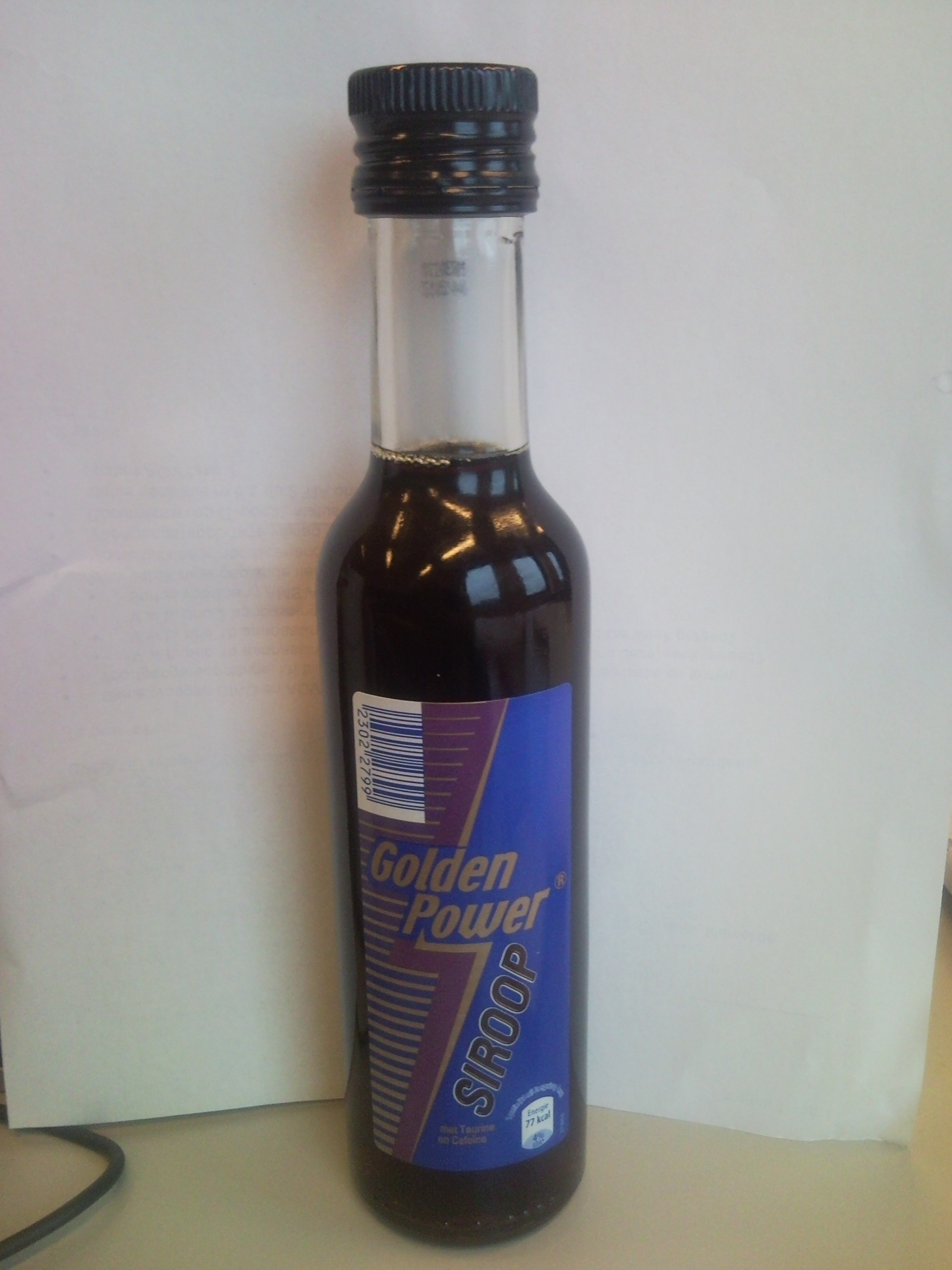 Een fles Golden Power Siroop (Energy Drink)